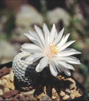 Mammillaria albiflora aus der Sammlung von „Andreae Kakteenkulturen“, Inh. Michael Januschkowetz, Ausserhalb Lengfeld 17, 64853 Otzberg-Lengfeld